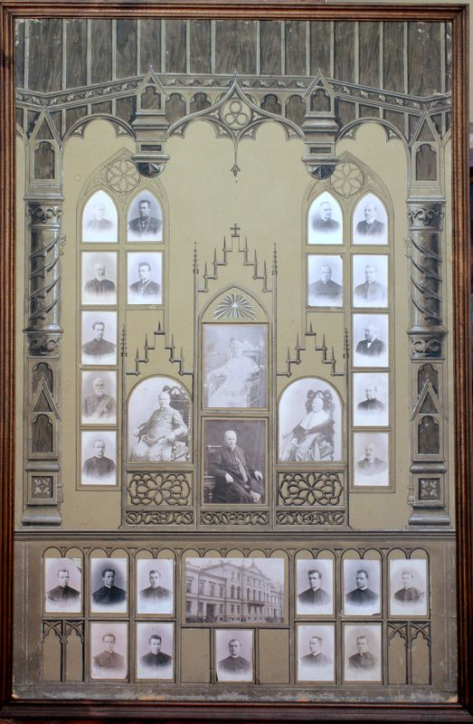 Vinjetė. Peterburgo dvasinės akademijos IV kurso auklėtiniai su profesoriais. Kairėje antroje eilėje iš viršaus – Jonas Mačiulis-Maironis, kuris 1894–1909 m. buvo Peterburgo dvasinės akademijos profesorius. Penktoje eilėje – Petras Pranciškus Būčys (1872–1951). Dešinėje antroje eilėje antrasis – Jurgis Matulevičius (1871–1927), centre – popiežius Pijus X (1835–1914).